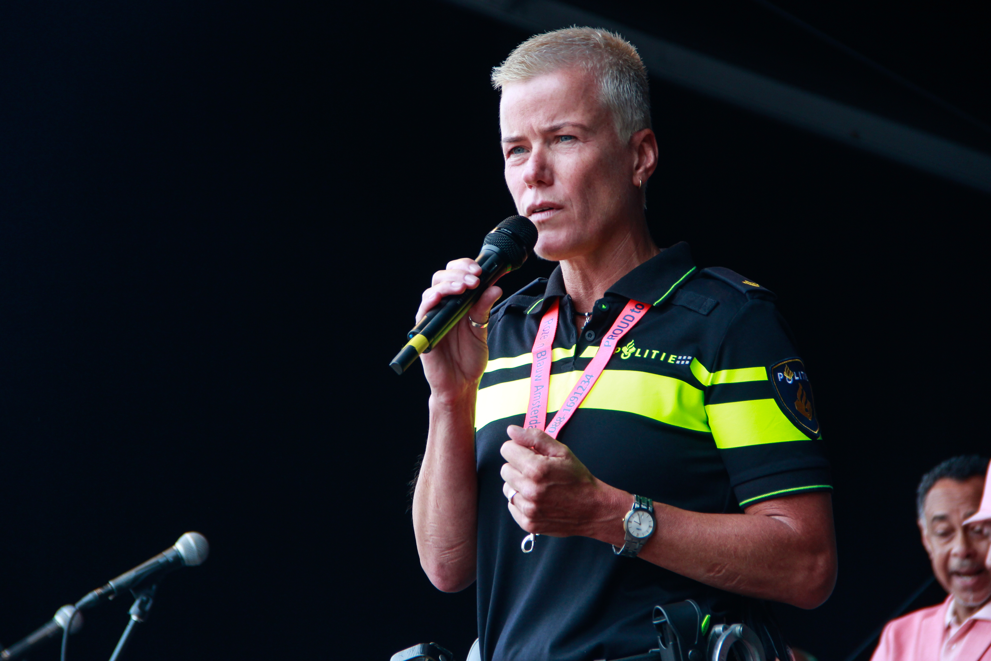 Voorzitter Ellie Lust van Roze in Blauw tijdens de opening van Roze Kwaku Summer Festival 2015